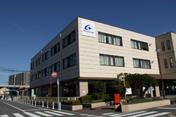 ムーンスター久留米本社